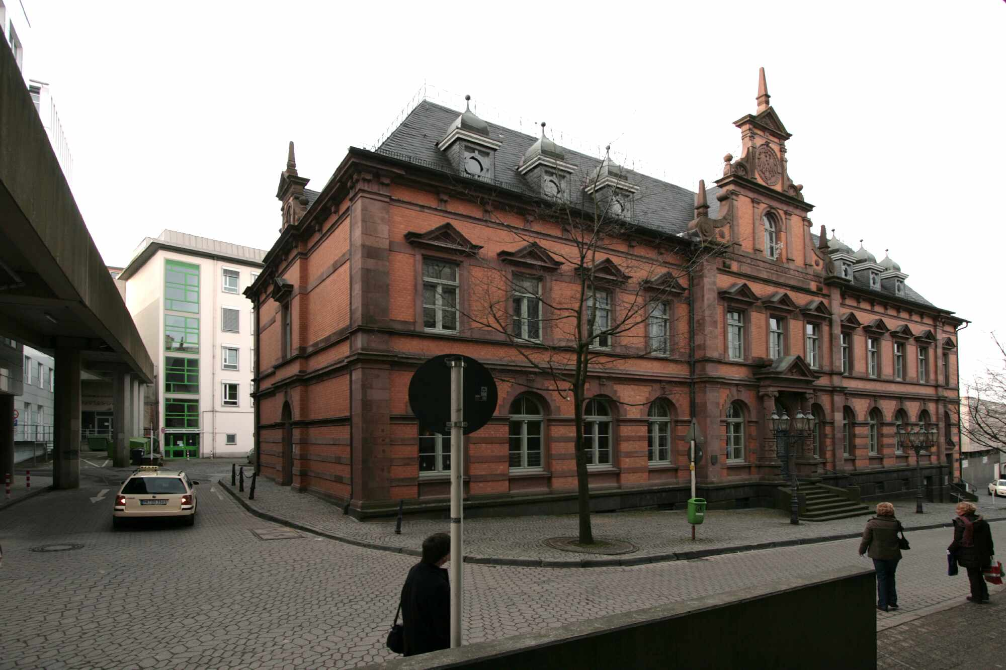 Lüdenscheid, Alte Post. → mehr Infos This image shows a heritage building in Germany, located in the North Rhine-Westphalian city Lüdenscheid (no. 41).